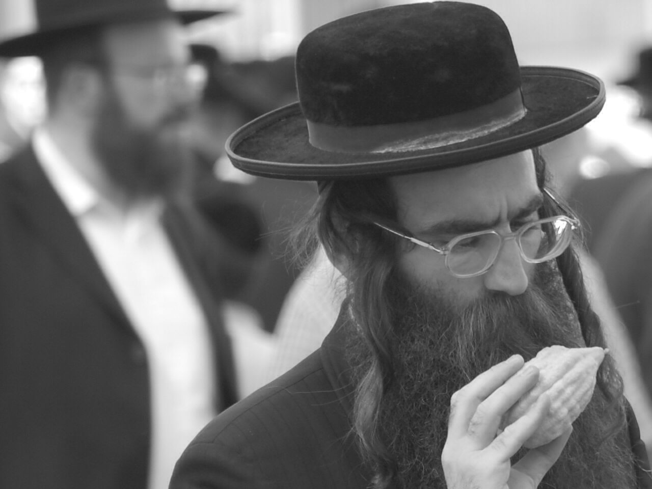 jew in jerusalem at ""sukkot""